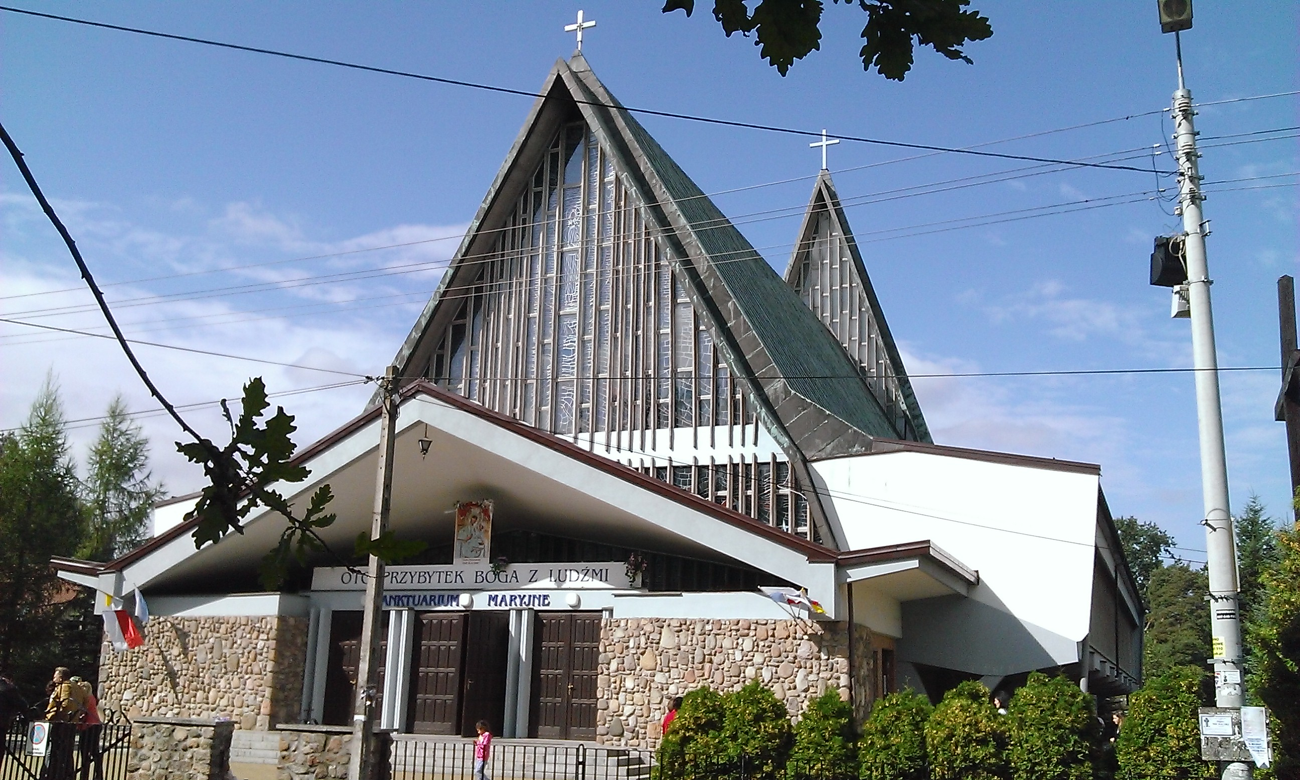 Sulejówek - kościół Najświętszej Maryi Panny Matki Kościoła